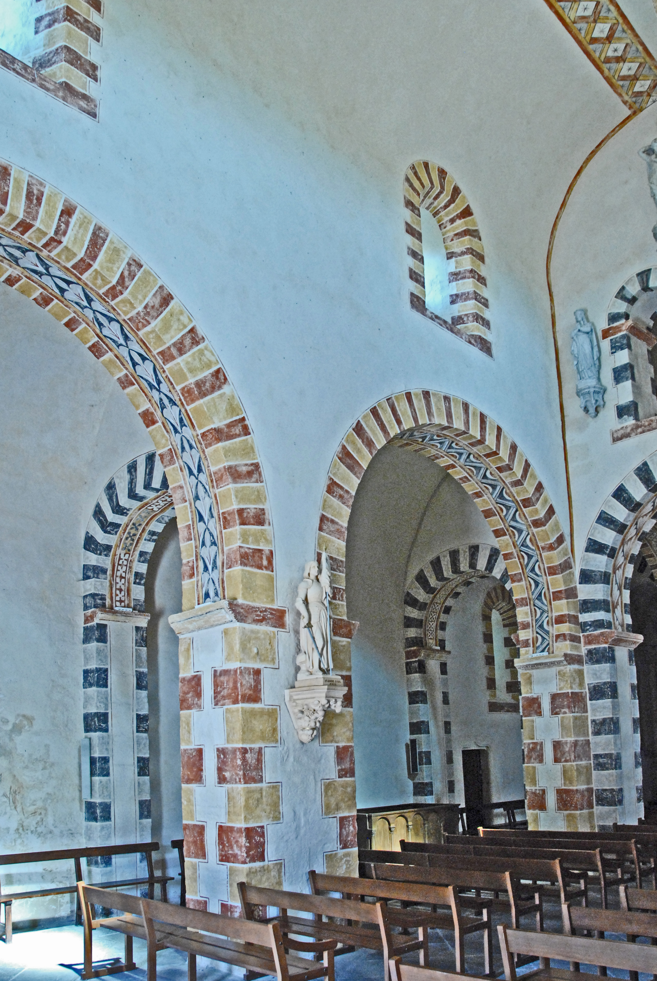 St.-Jean Glaine-Montaigut, MIttelschiff Nordwand